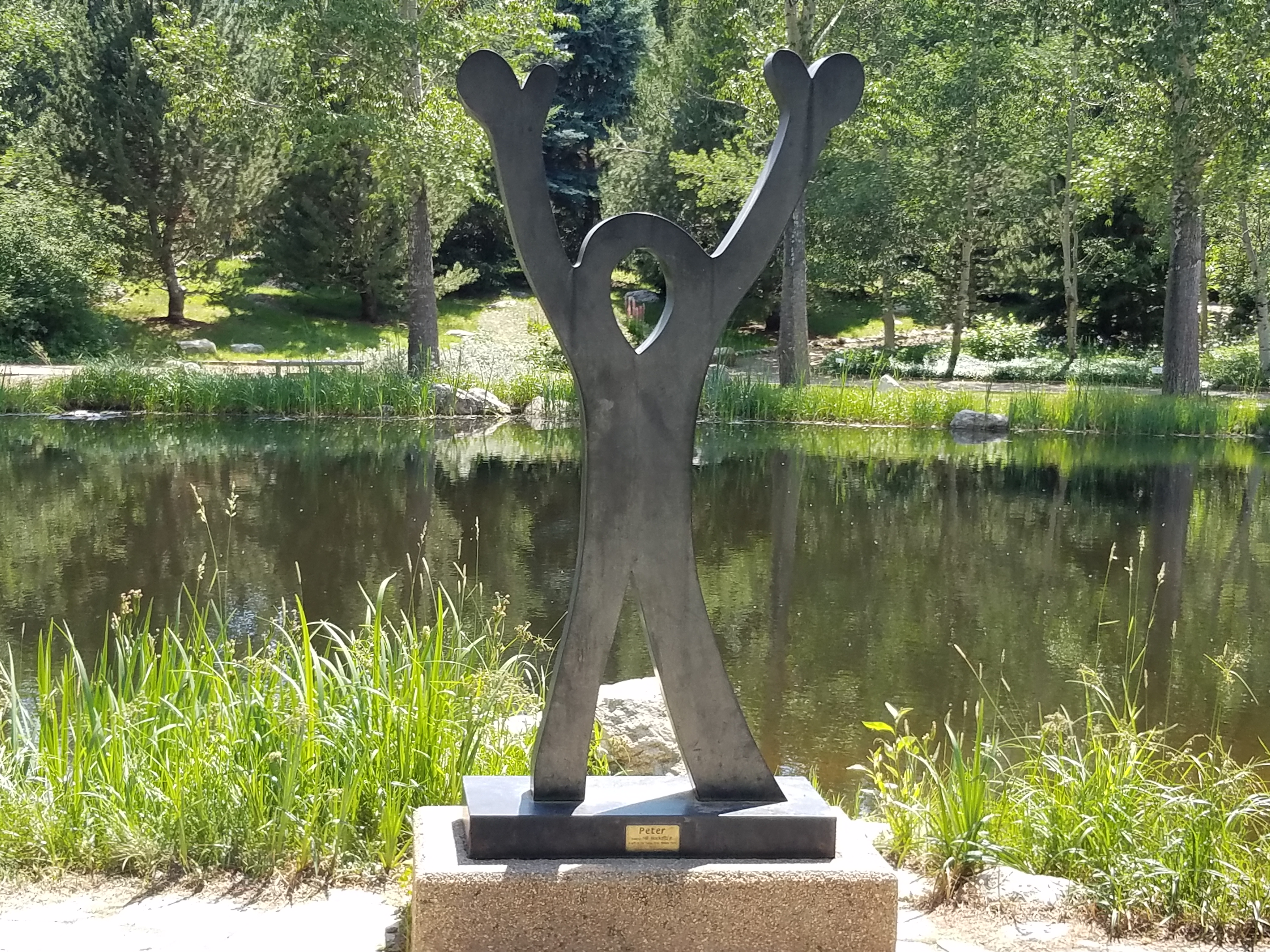 Yampa Valley Botanic Gardens